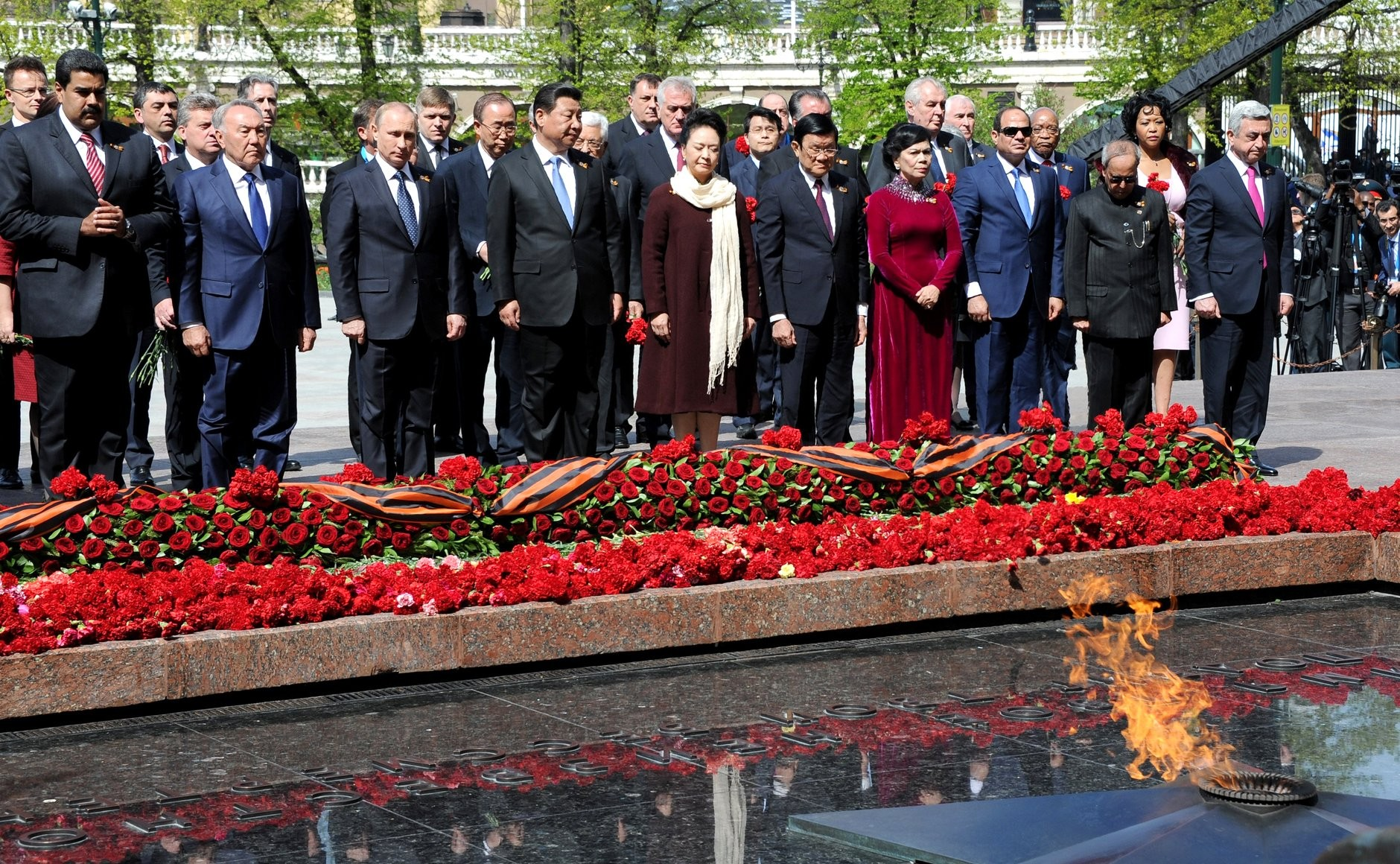 Вместе с главами иностранных государств и правительств Владимир Путин почтил память погибших в Великой Отечественной войне, возложив цветы к Могиле Неизвестного Солдата в Александровском саду.